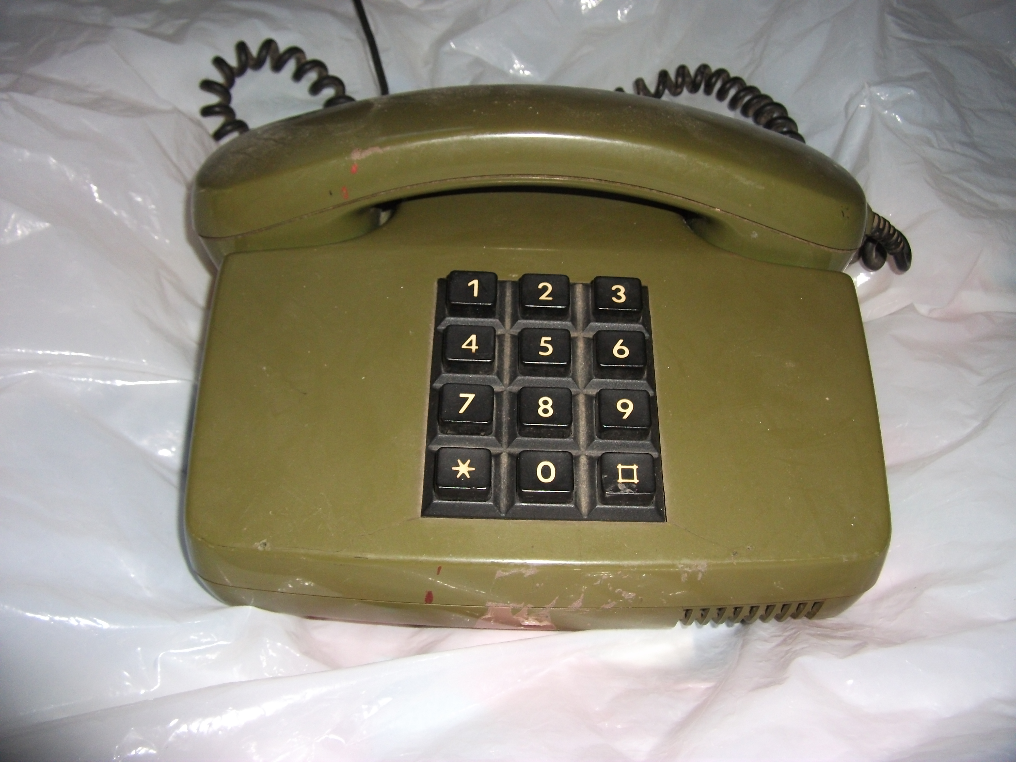 FeTAp 751, für die Deutsche Bundespost im Februar 1982 von Siemens hergestellt